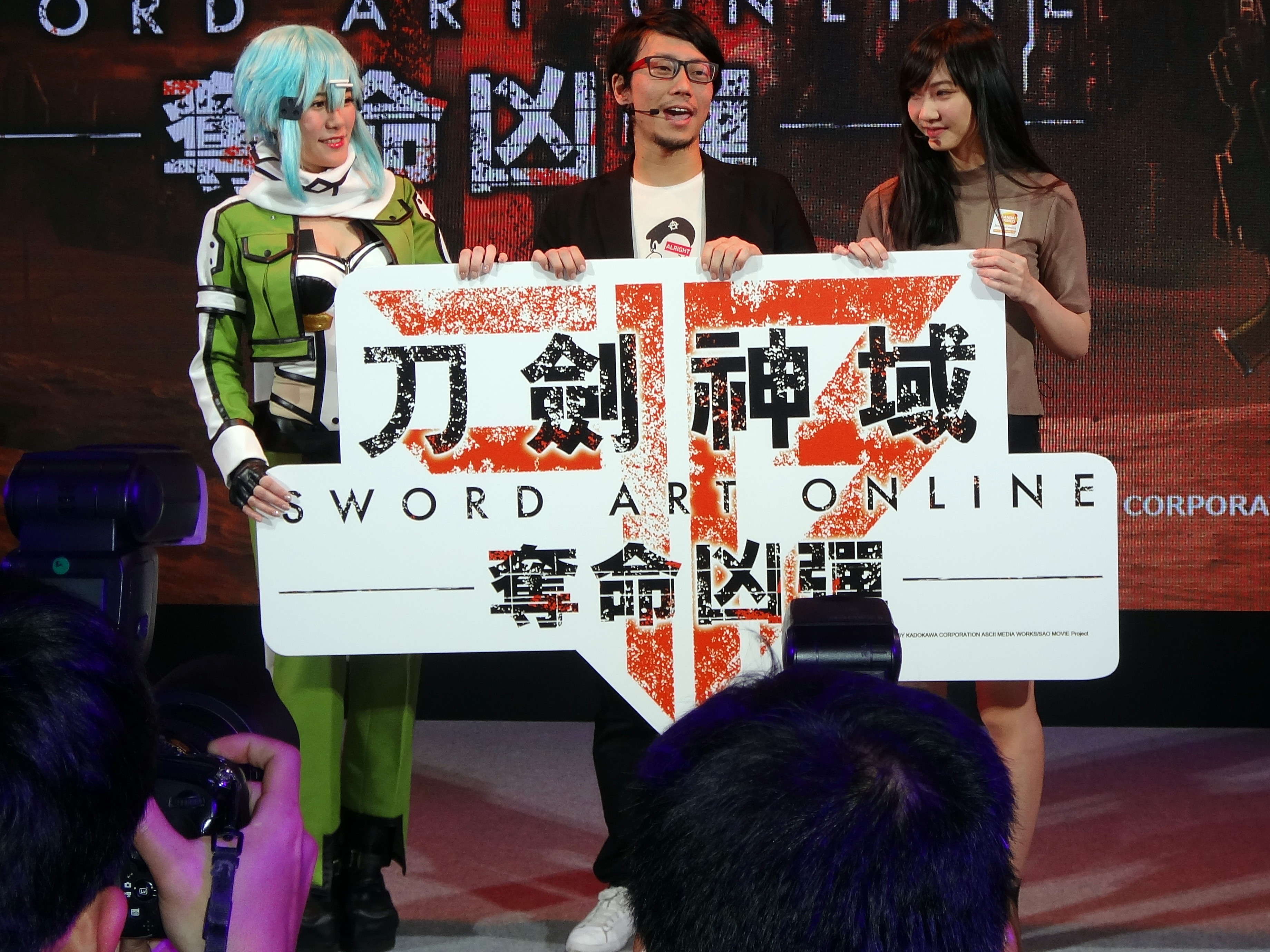 2018台北國際電玩展，台灣萬代南夢宮娛樂《刀劍神域 奪命凶彈》製作人舞台活動。左起：《刀劍神域 奪命凶彈》詩乃cosplayer、《刀劍神域 奪命凶彈》製作人二見鷹介、實況主Sandy。